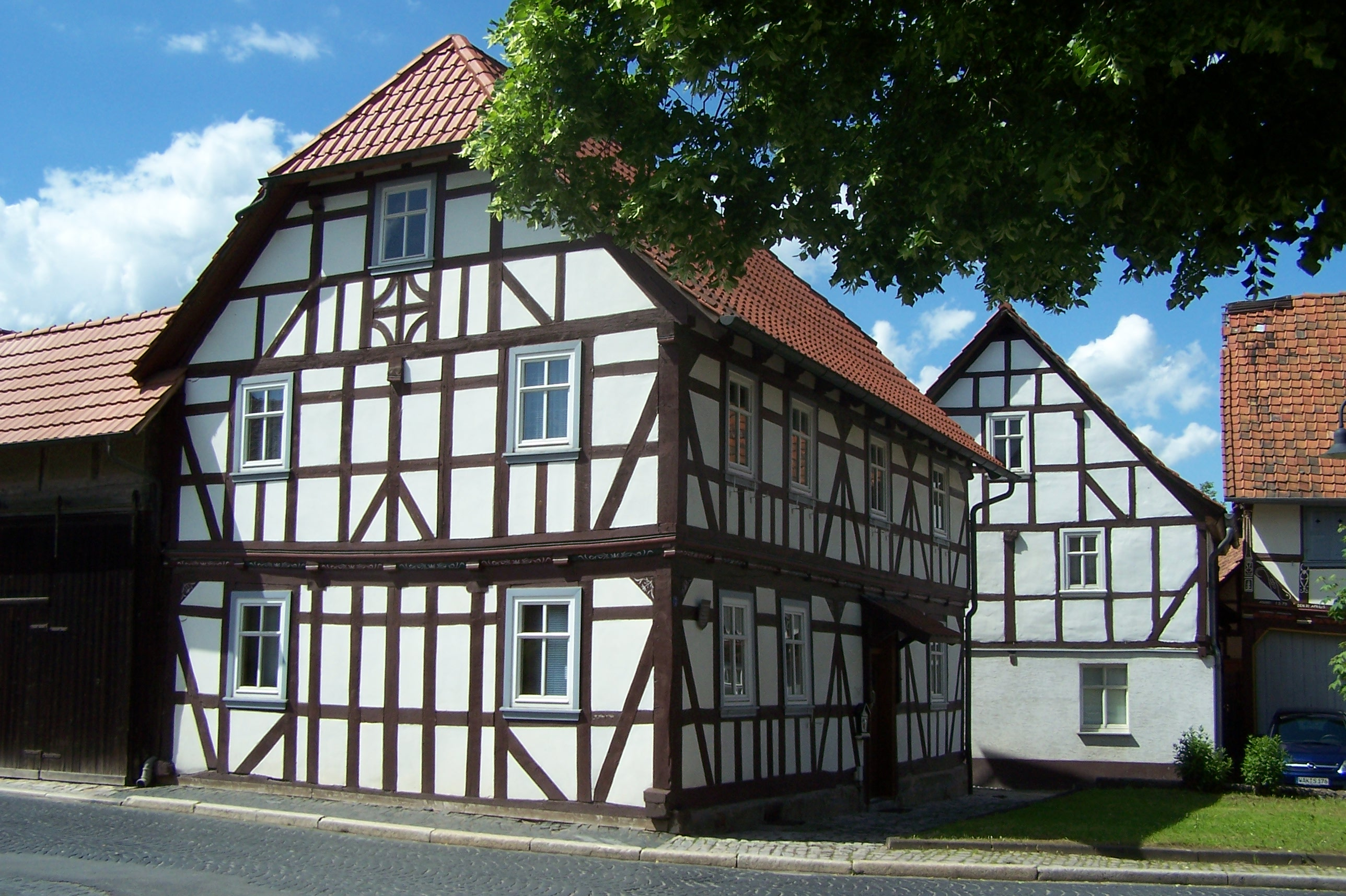 In der denkmalgeschützten Ortslage von Großburschla.